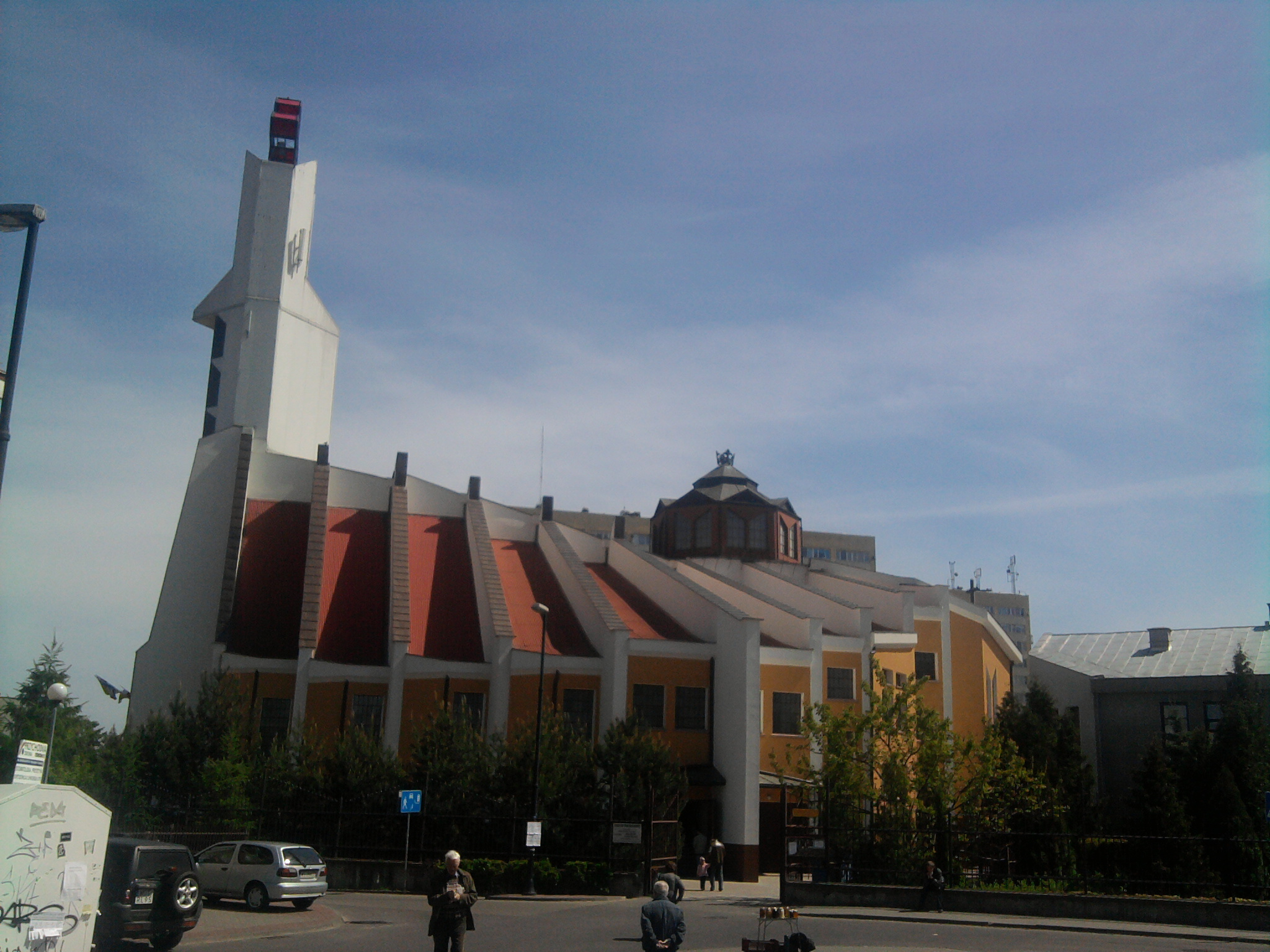 kościół Niepokalanego Poczęcia NMP Warszawa Wrzeciono